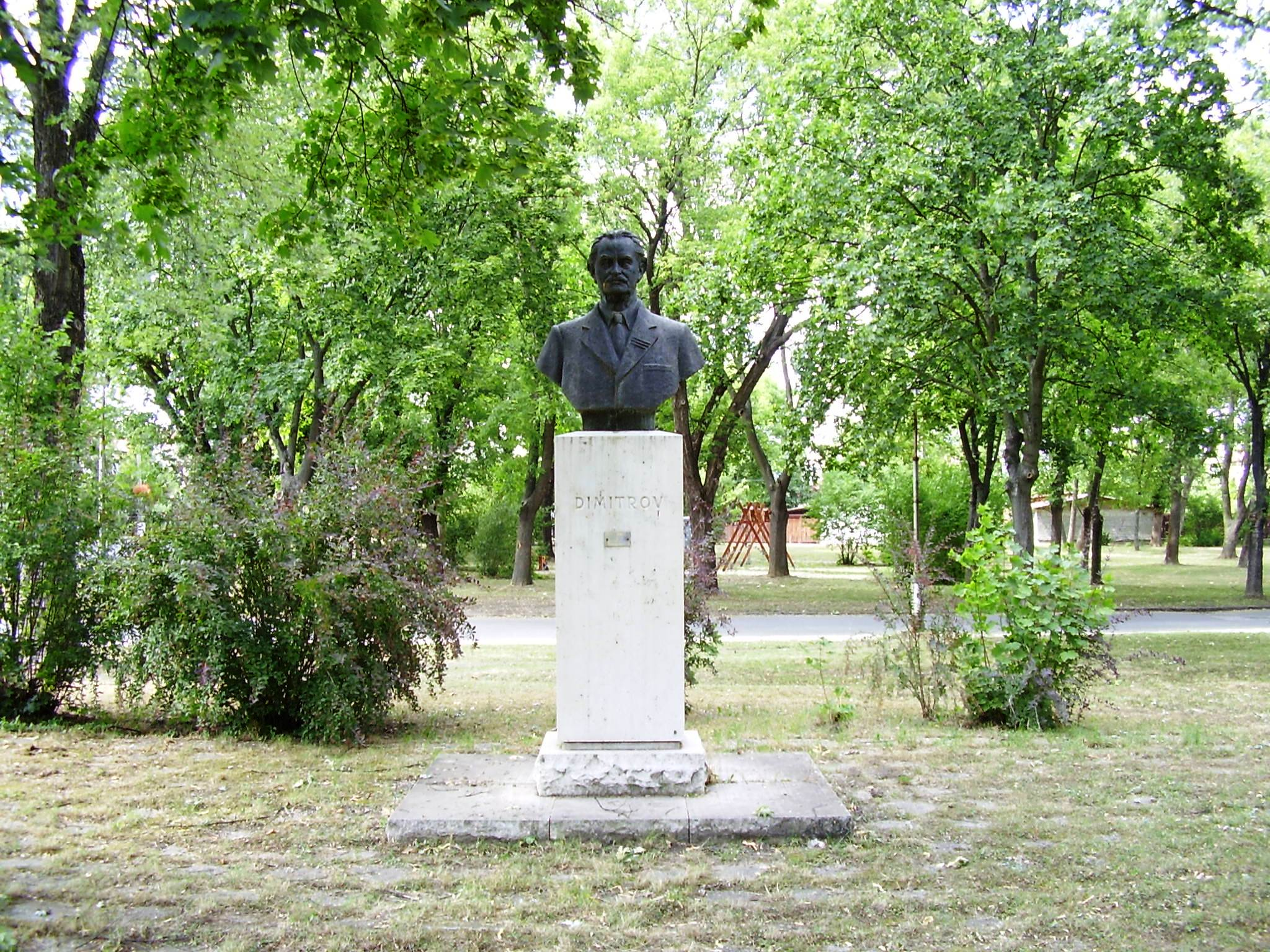 Konrád Sándor szobra Kazincbarcikán található az Alsóvárosi körút közelében a Kőrösi Csoma Sándor-parkban található. Kazincbarcika testvérvárosától, Dimitrovgrádtól kapta adományként Georgij Dimitrov bronz mellszobrát.